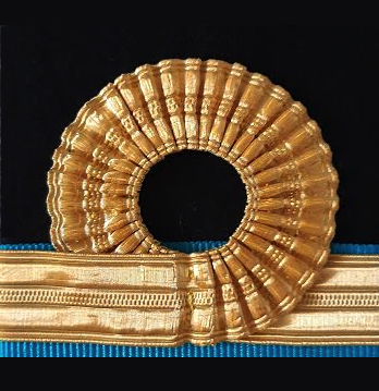 El distintivo del Cuerpo de Ingenieros de la Armada consiste en la coca del Cuerpo General sobre fondo azul celeste